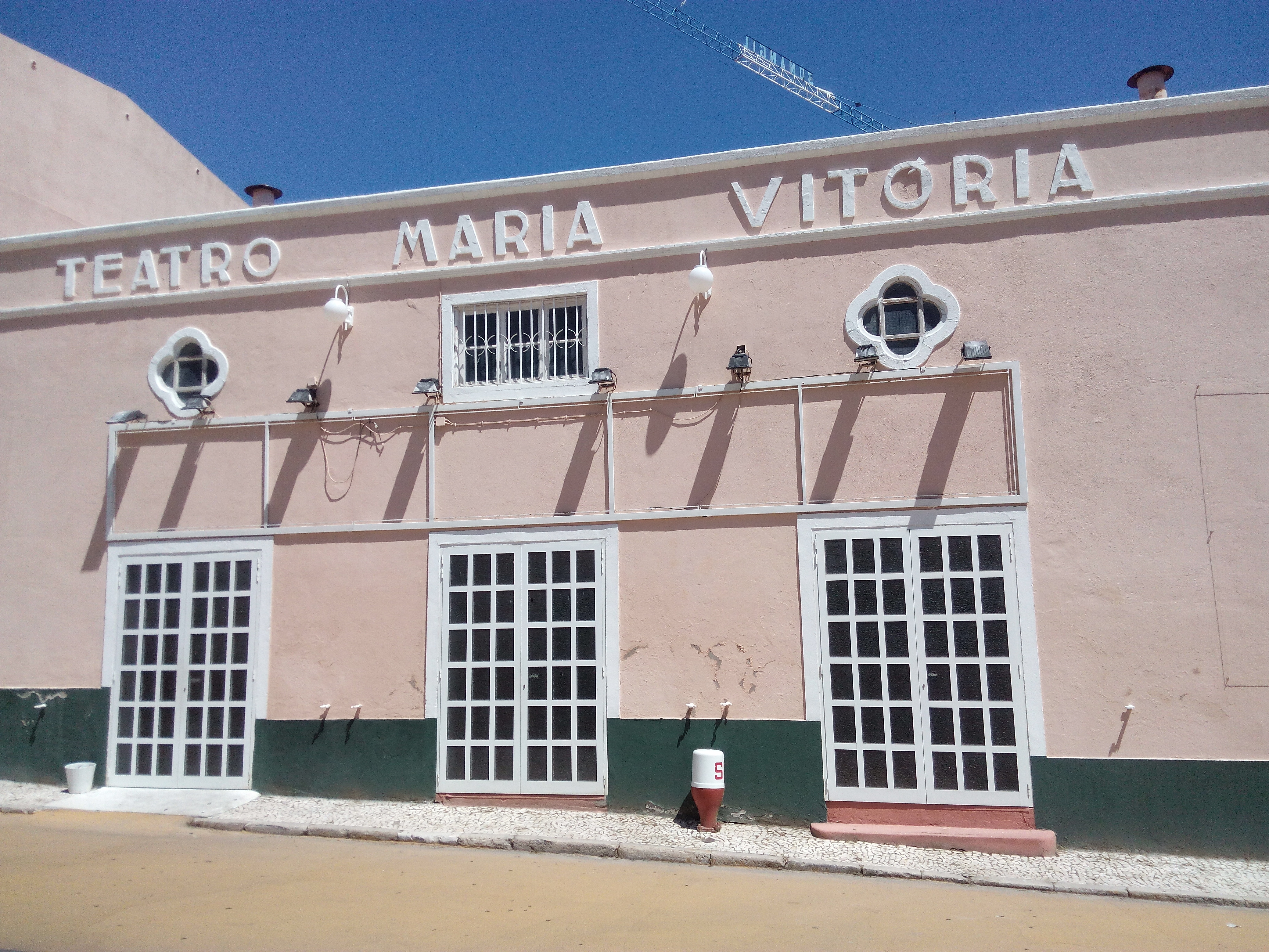 Teatro Capitólio, Lisbon Portugal